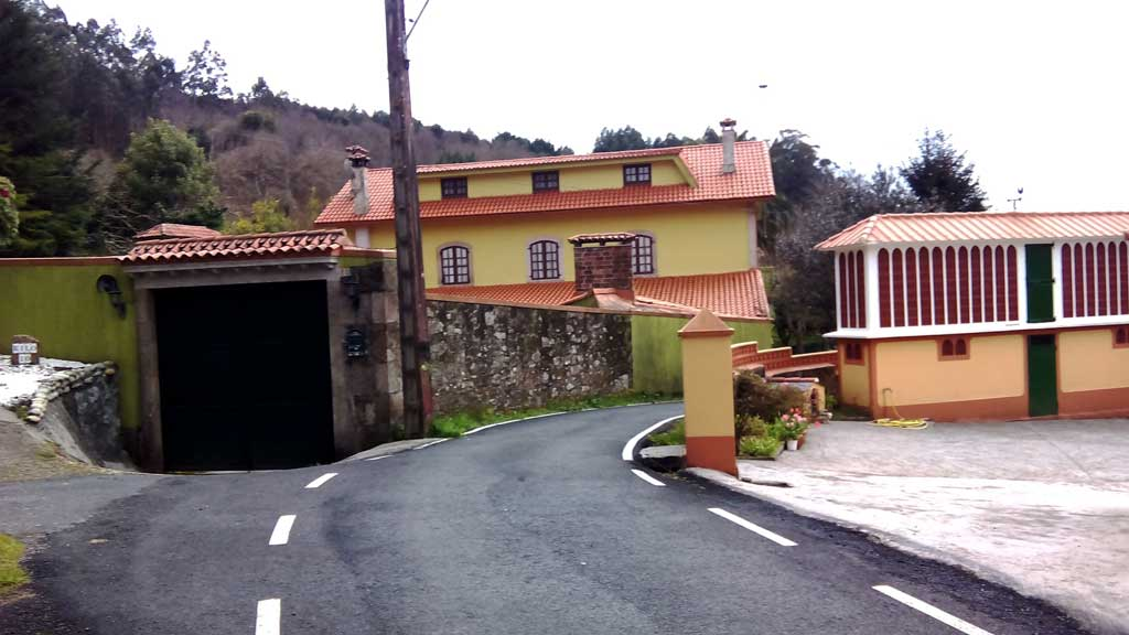 Vista de Rilo, Mandiá, Ferrol, A Coruña.